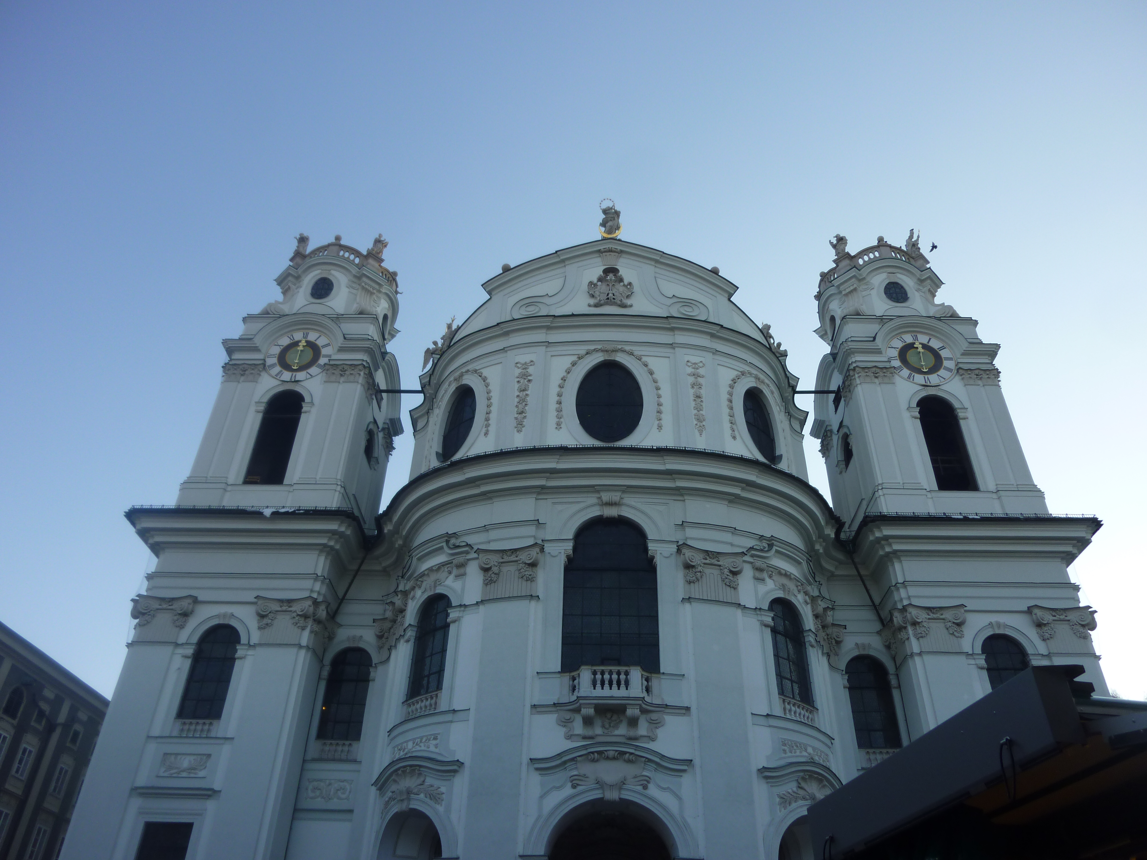 Salzburg by Stefanjurca on Flickr